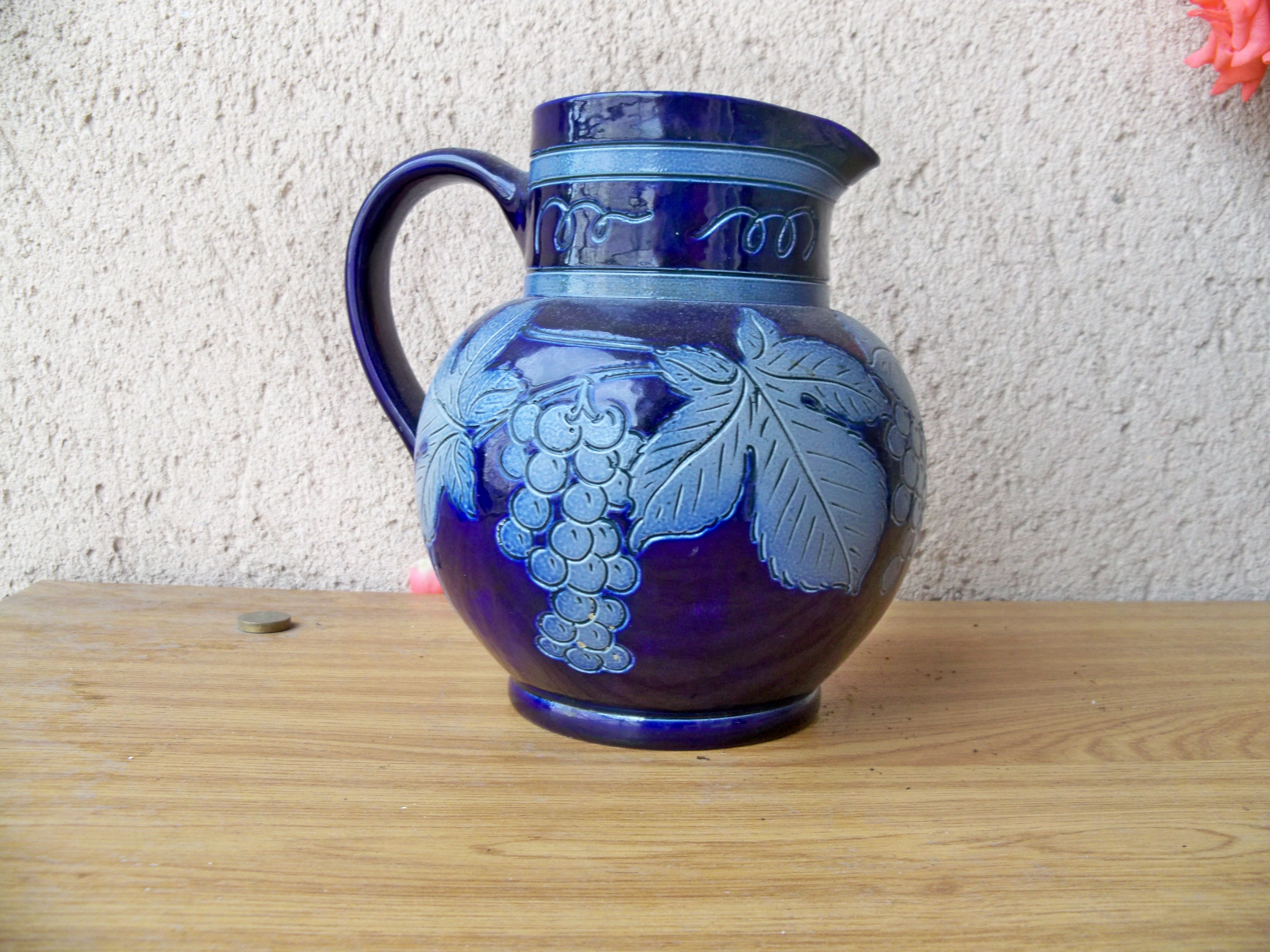 poterie en grès de Betschdorf